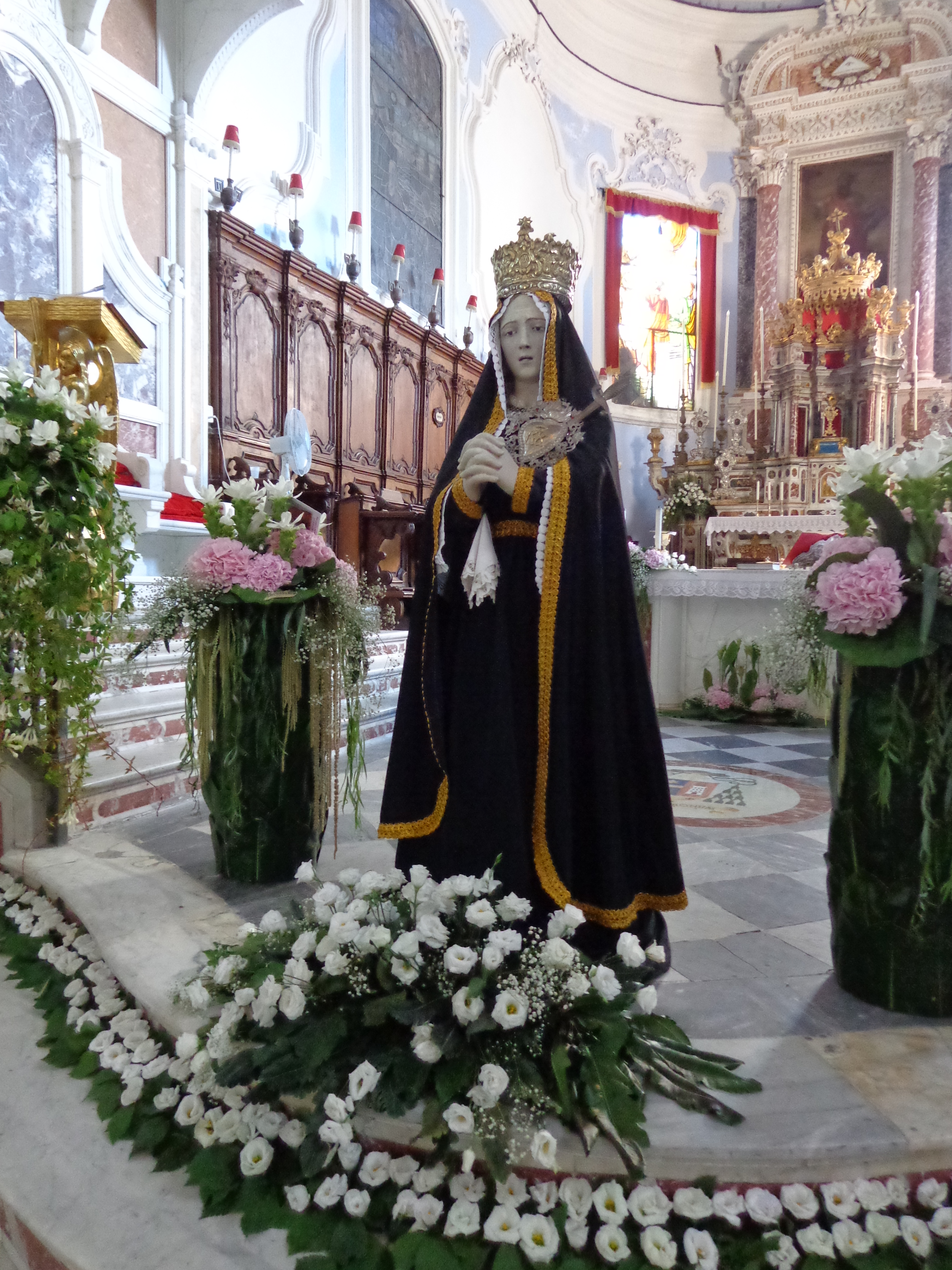 Altare maggiore e Addolorata